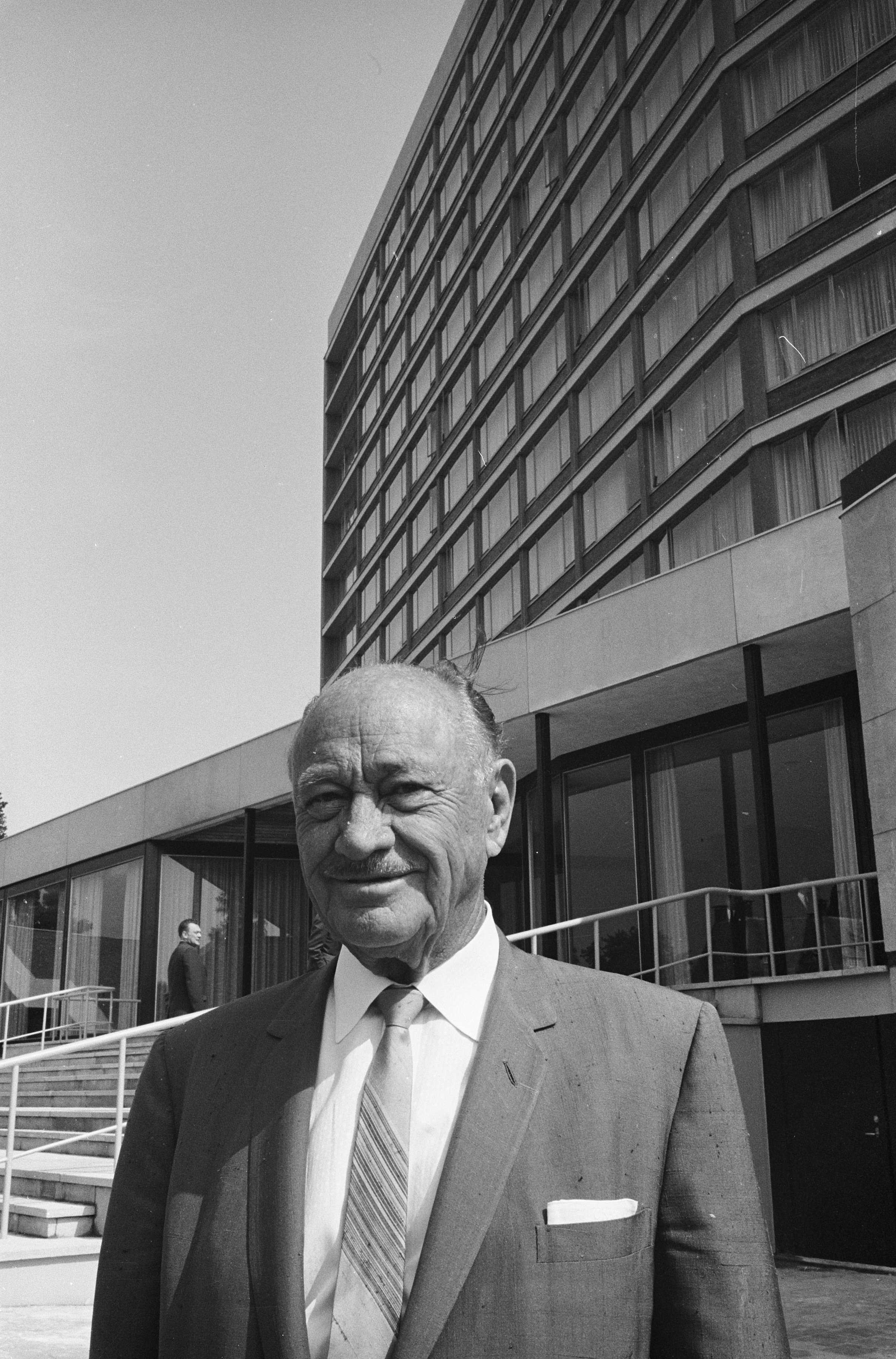 Collectie / Archief : Fotocollectie Anefo Reportage / Serie : [ onbekend ] Beschrijving : Conrad N. Hilton voor zijn nieuwe hotel in Amsterdam (portret) Datum : 9 juli 1962 Locatie : Amsterdam, Noord-Holland Trefwoorden : hotels Persoonsnaam : Conrad N. Hilton Fotograaf : Pot, Harry / Anefo Auteursrechthebbende : Nationaal Archief Materiaalsoort : Negatief (zwart/wit) Nummer archiefinventaris : bekijk toegang 2.24.01.05 Bestanddeelnummer : 914-1160